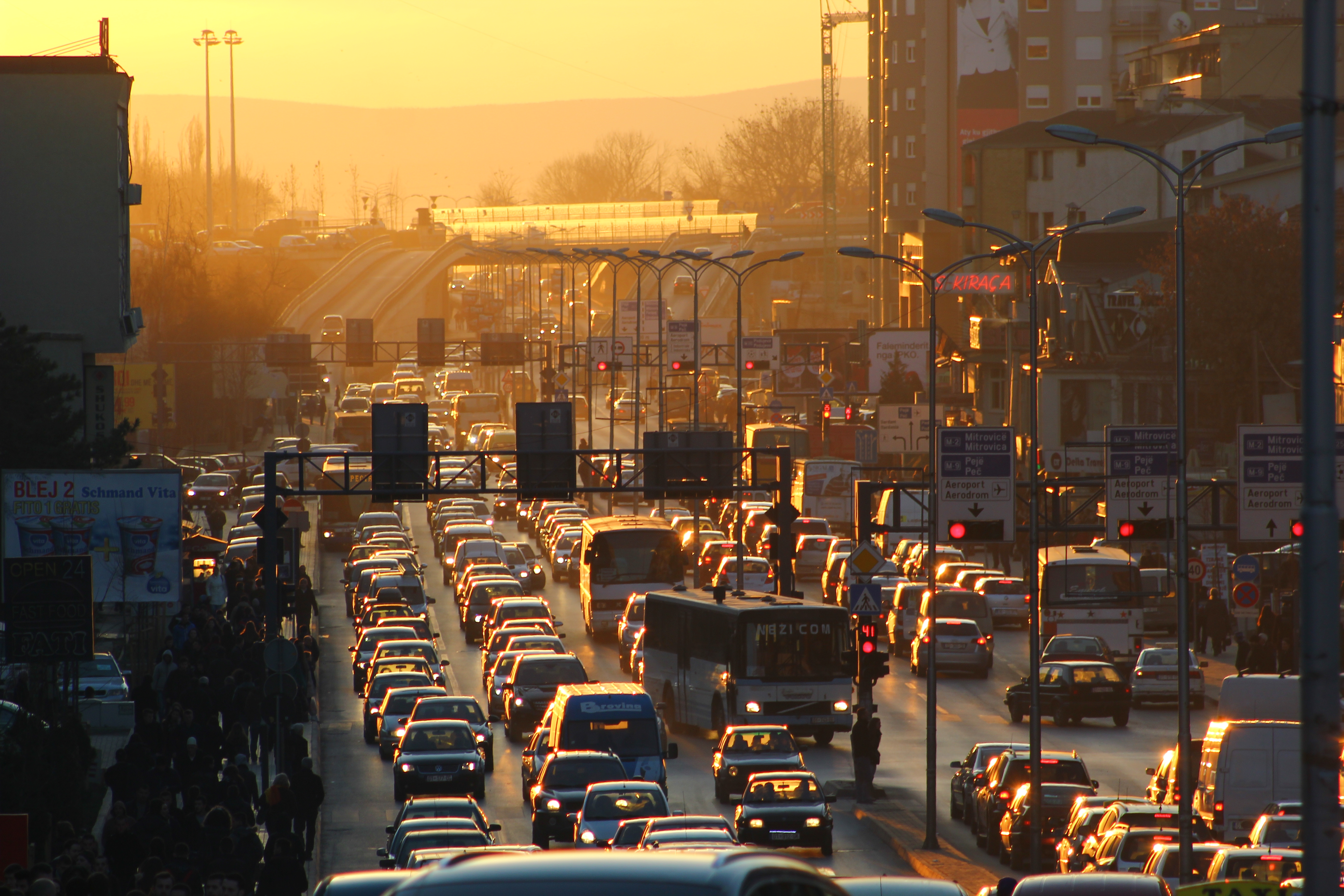 Trafiku në Prishtinë, i cili zakonisht rëndohet në orët e pasdites.